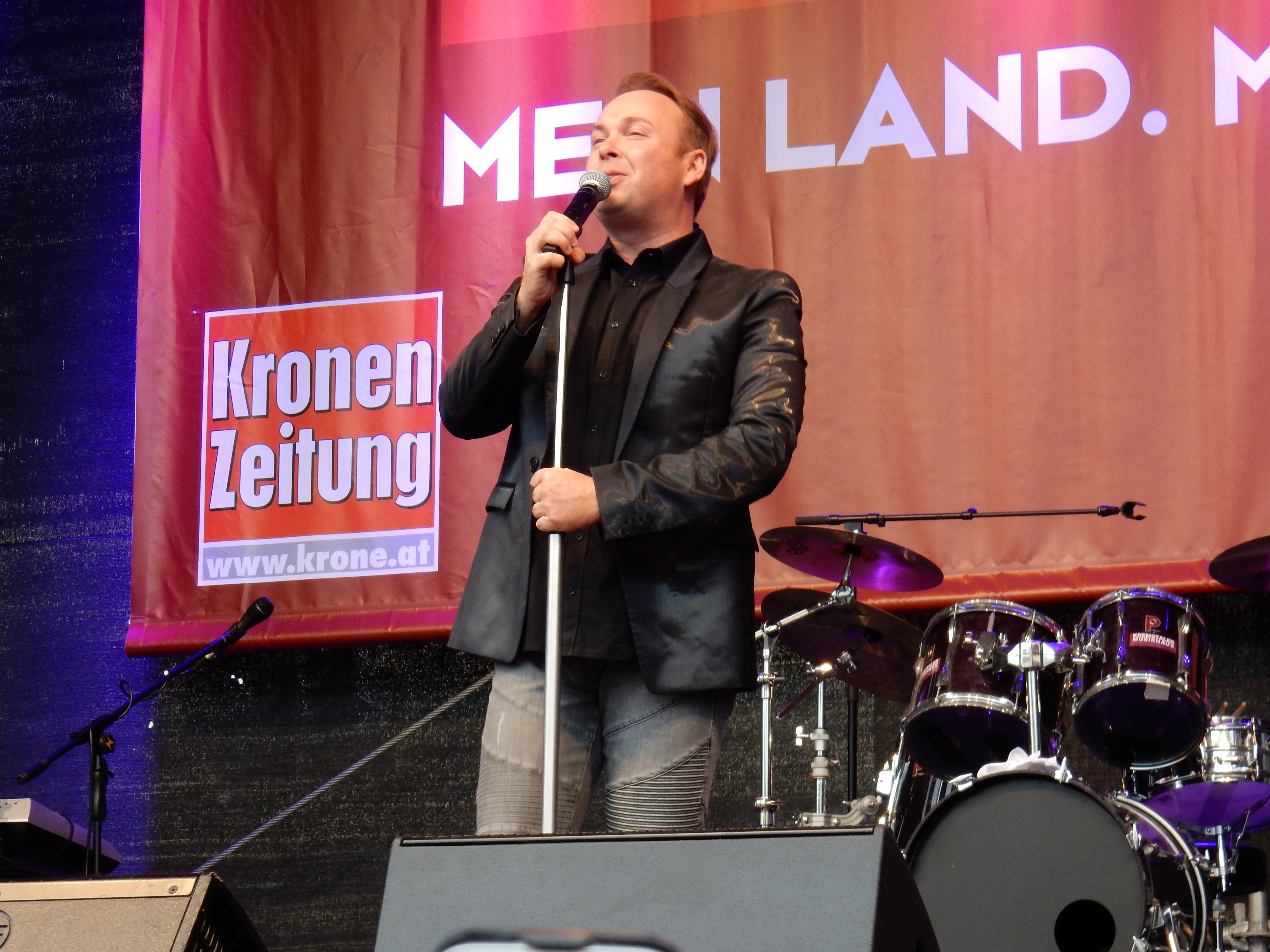 Oliver Haidt live beim Linzer Kronefest 2015